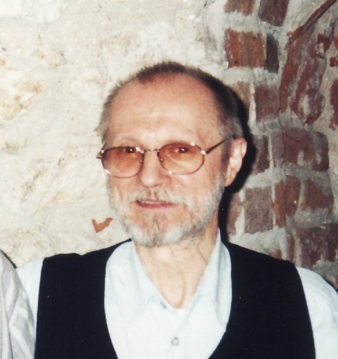 נגן הסקסופון יאנוש מוניאק בקרקוב